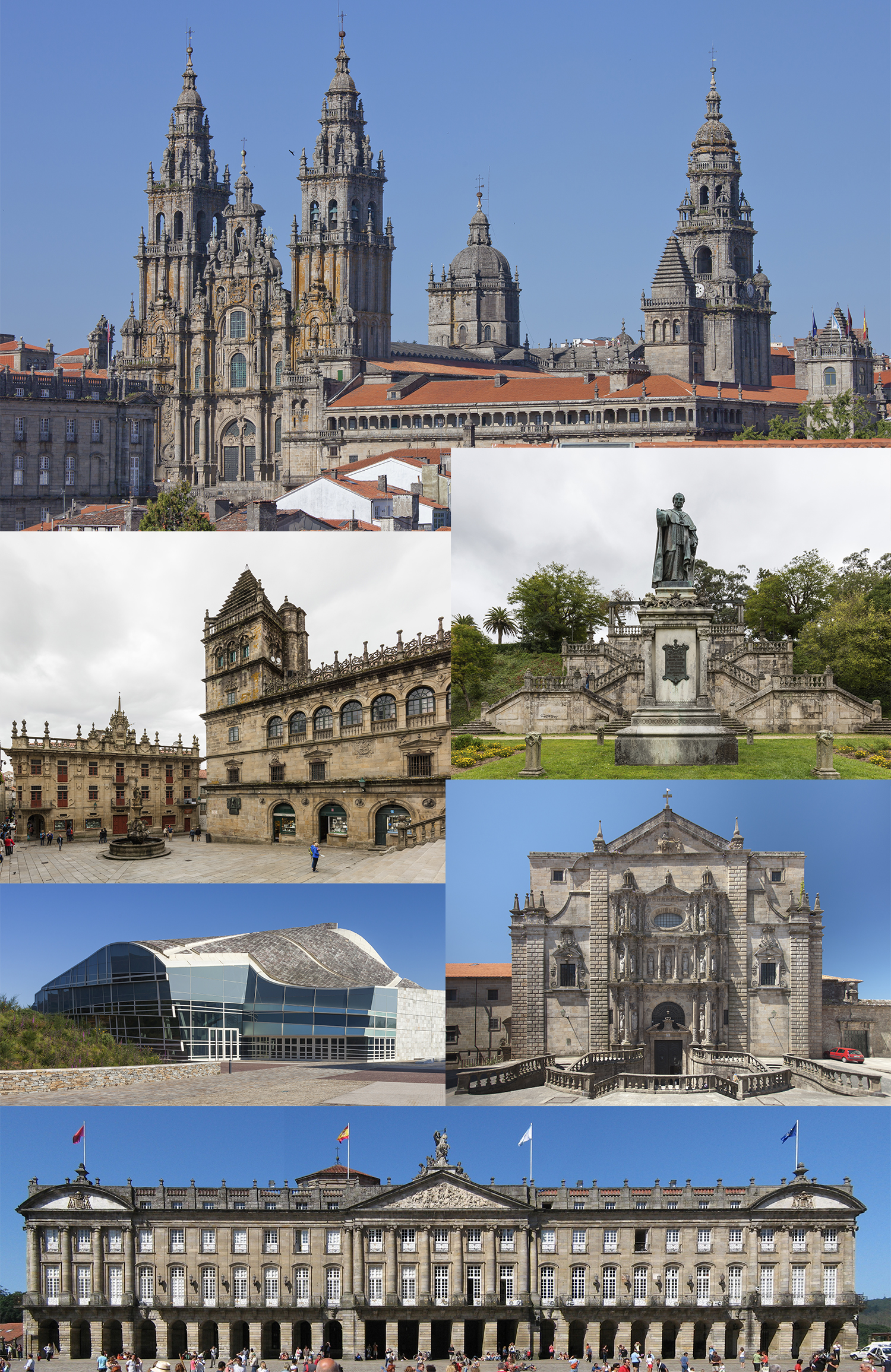 Collage de Santiago de Compostela